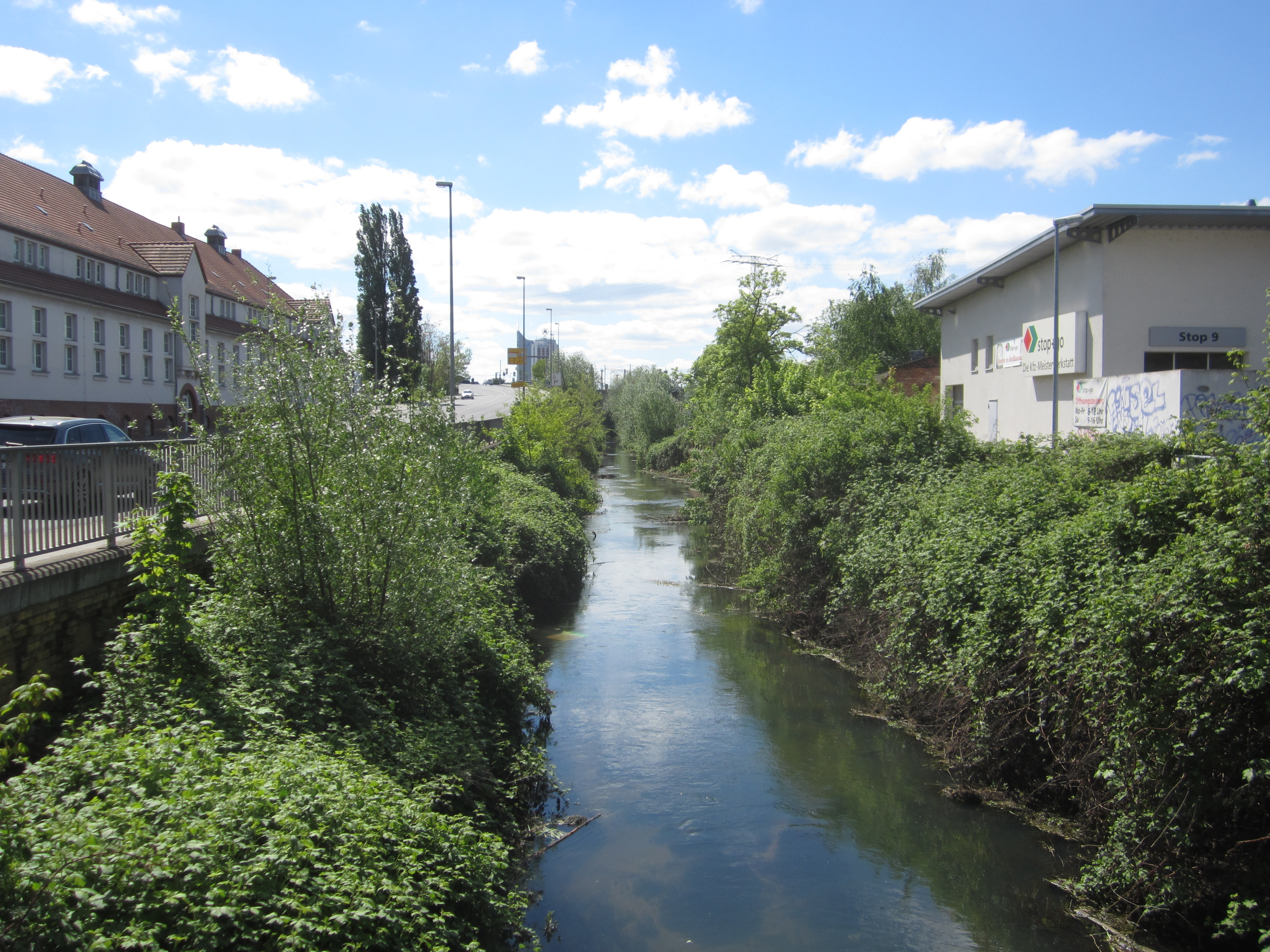 Parthe an der Adenauerallee, Blick nach Süden